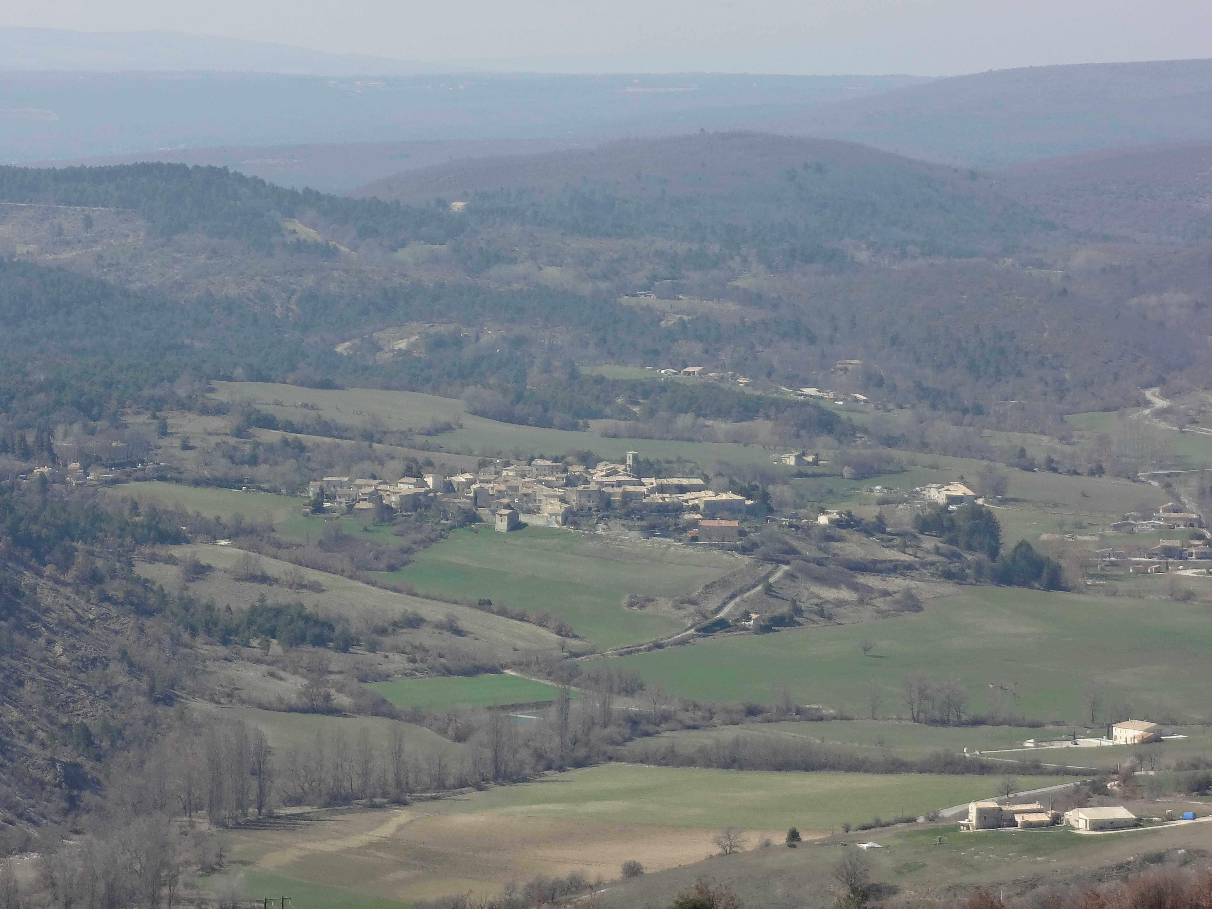 Le Revest-des-Brousses, vue des Hautes-Plaines, hauteur de la commune Mane